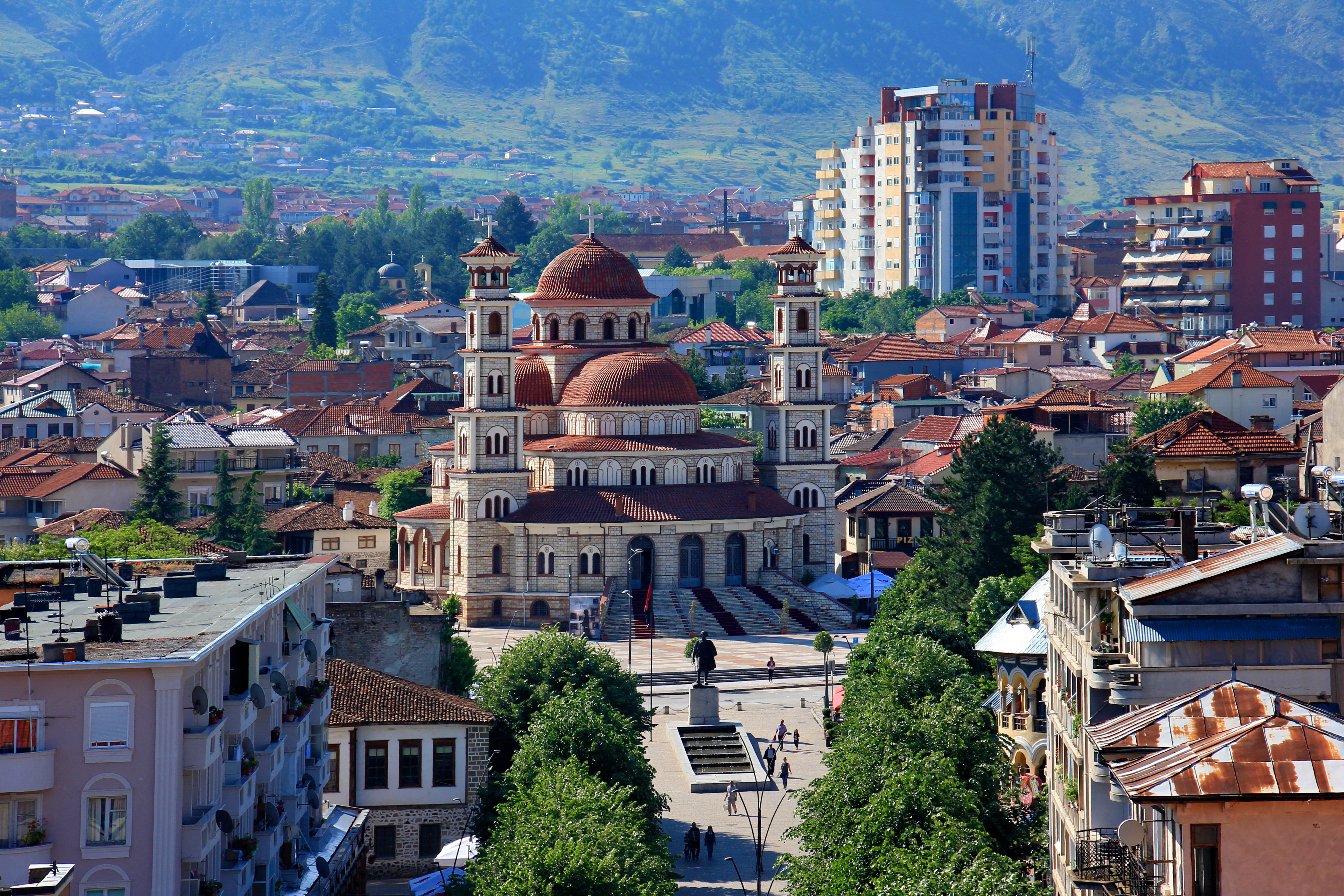 Katedralja e Korçës